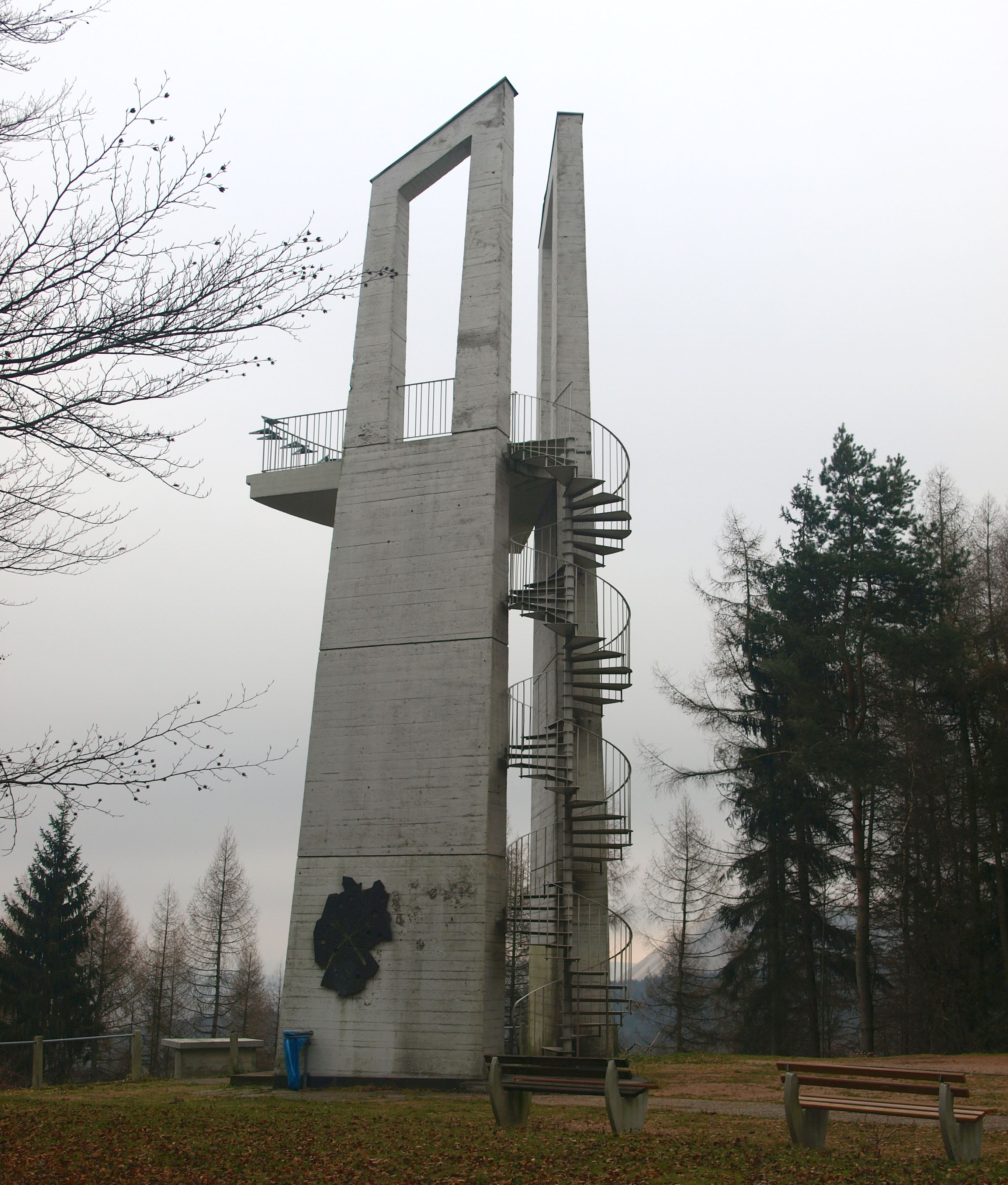 Das Mahnmal Bodelsruh ist eine zur deutschen Teilung errichtete Turmanlage oberhalb der hessischen Dörfer Wildeck-Hönebach und Heringen-Kleinensee. Der Turm wurde im Jahre 1963 von Kleinensee mit Unterstützung der hessischen Landesregierung gebaut.